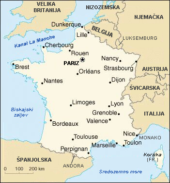 Ovu sam sliku napravio na temelju CIA-ine slike u javnom vlasniÅ¡tvu. --Zmaj 16:33, 1. lipanj 2007. (CEST)